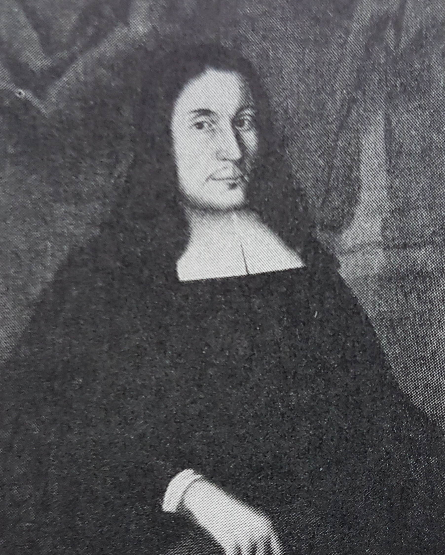 Magnus Celsius, avfotograferad porträttbild från Allhems Svenskt konstnärslexikon.